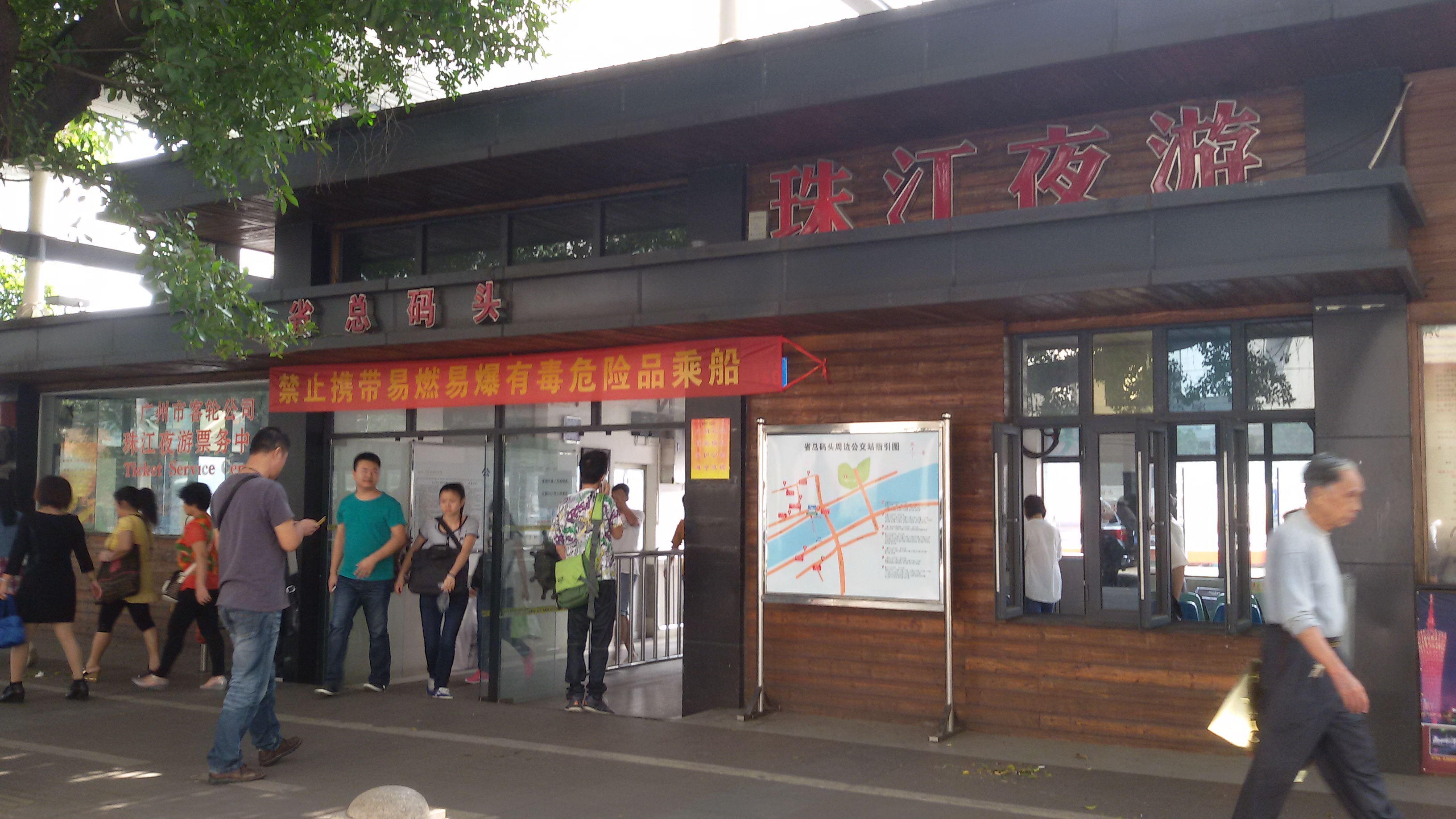 粵語: 省总码头